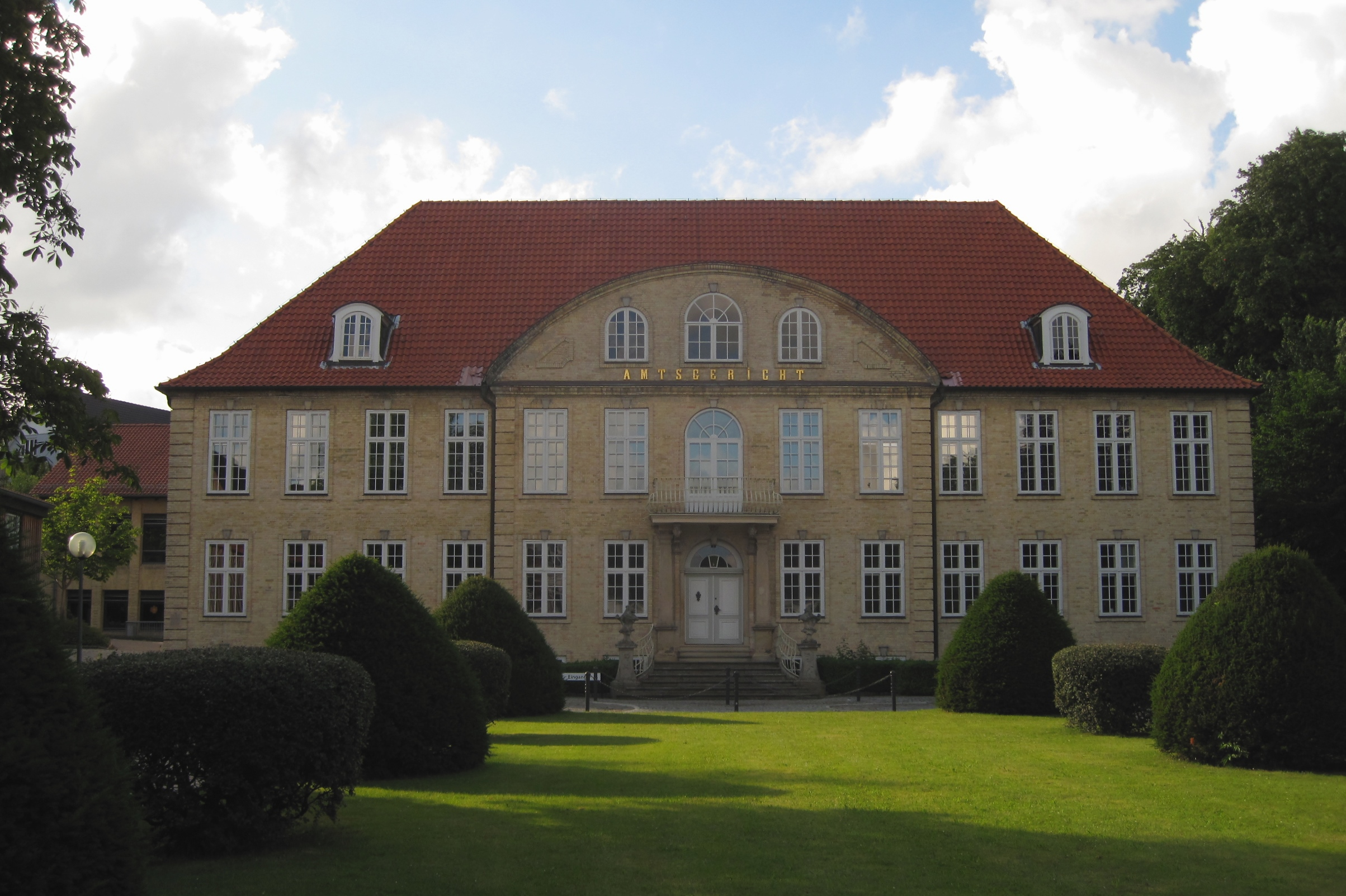 Amtsgericht Schleswig in Schleswig, Lollfuß 78.